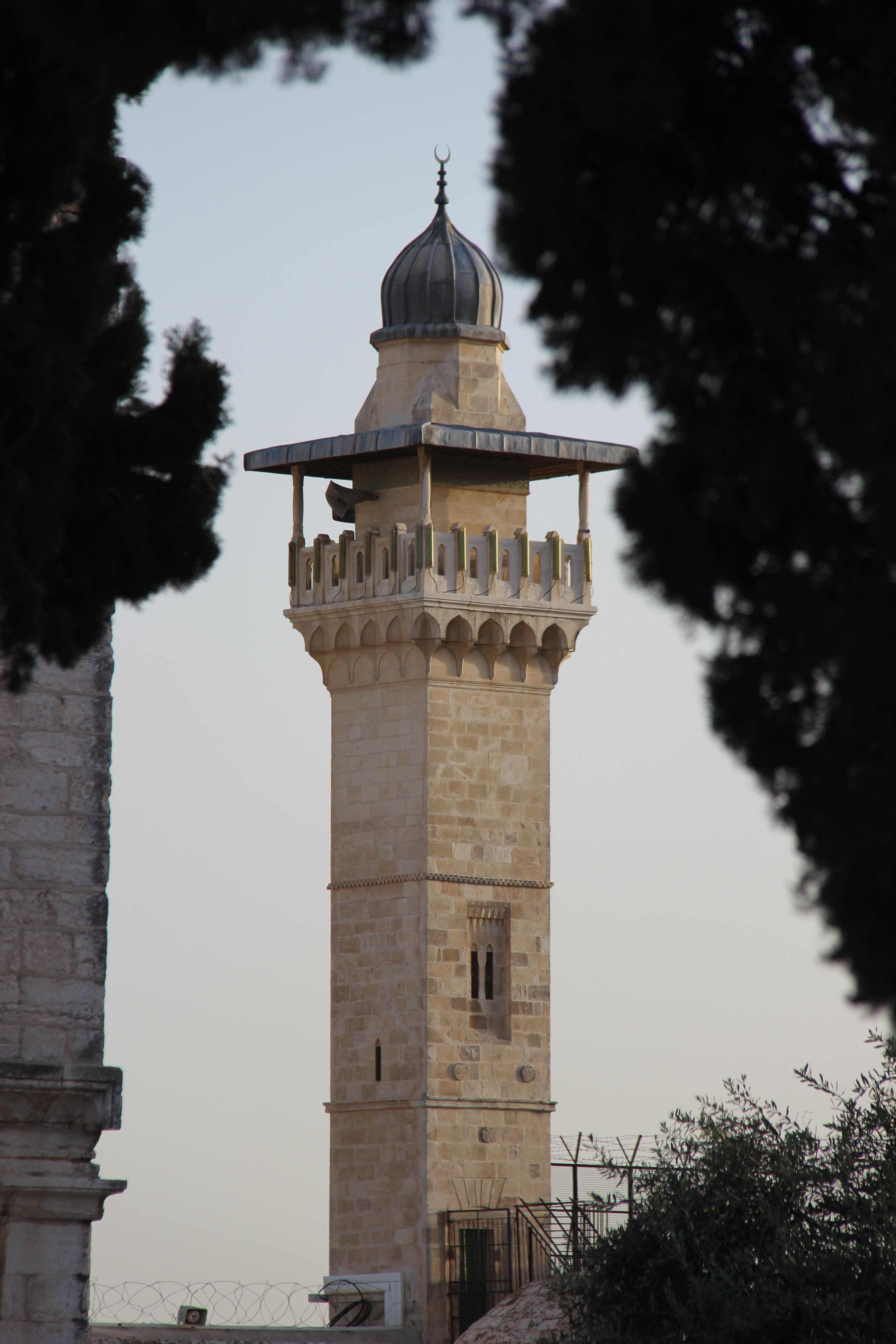 مئذنة باب المغاربة، إحدى مآذن المسجد الأقصى في القدس.